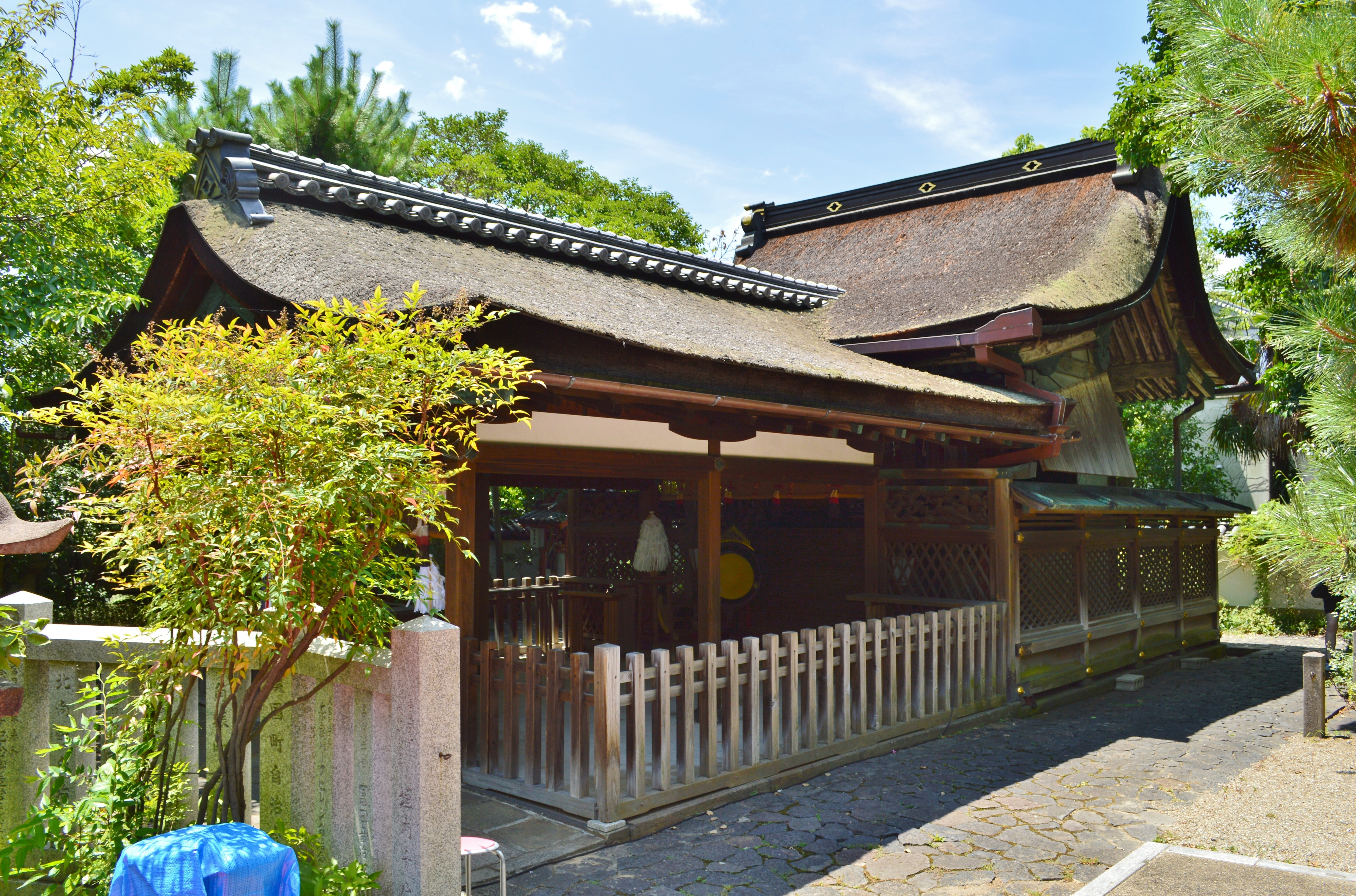 漢國神社 社殿